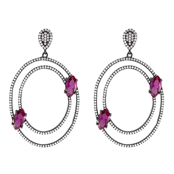 Pendientes realizados en Plata negra con circonitas blancas y grandes cristales en tono rubí.]